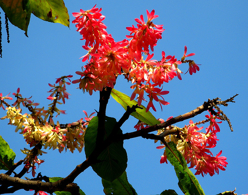 pau de formiga, (Triplaris americana L., syn. Triplaris brasiliana Cham.), Ceret park sao paulo Brasil